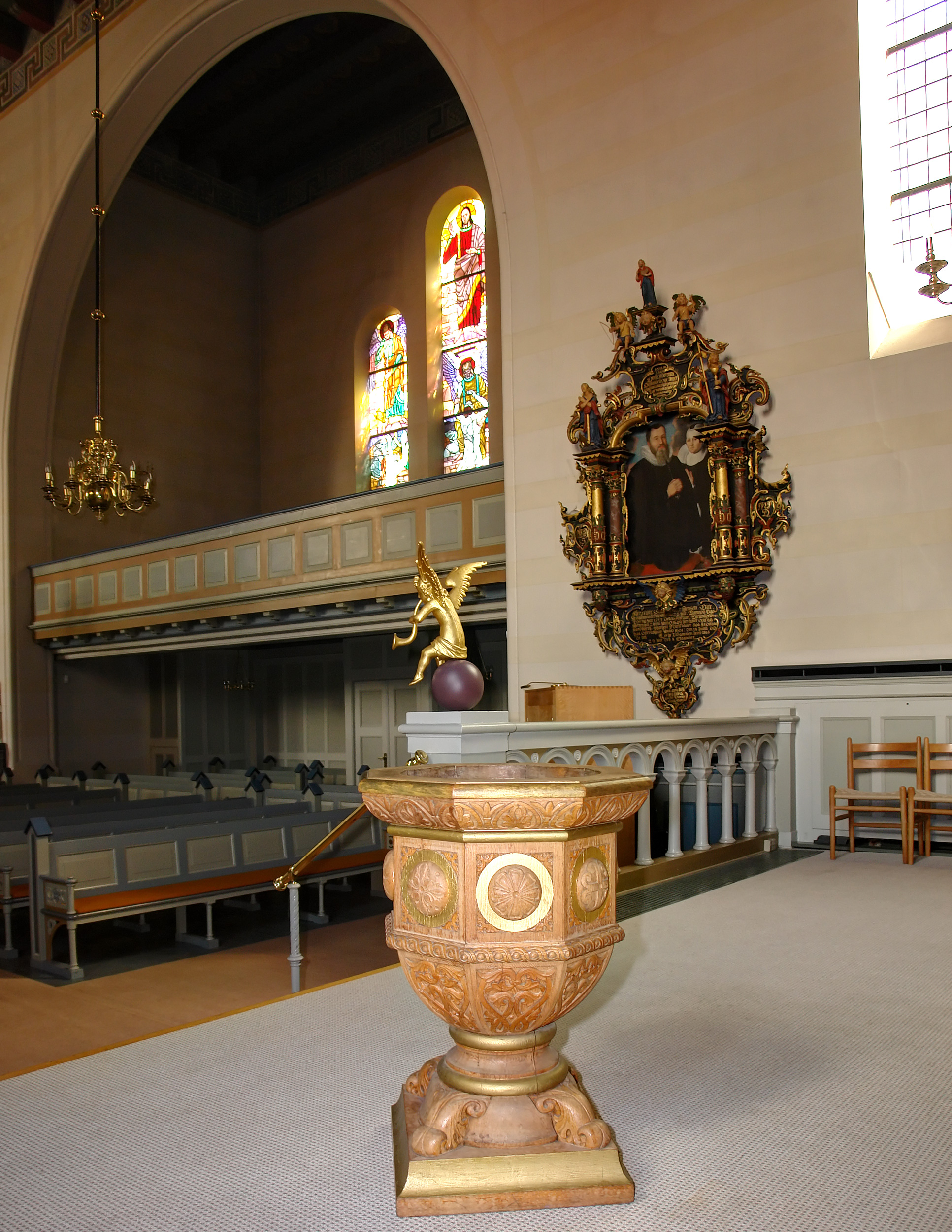 Nikolai Kirche Holbæk, DK: Taufbecken von 1872, Entwurf Christian Hansen. Epitaph: Stadtrat Peter Jensen (1583–1649) und Frau